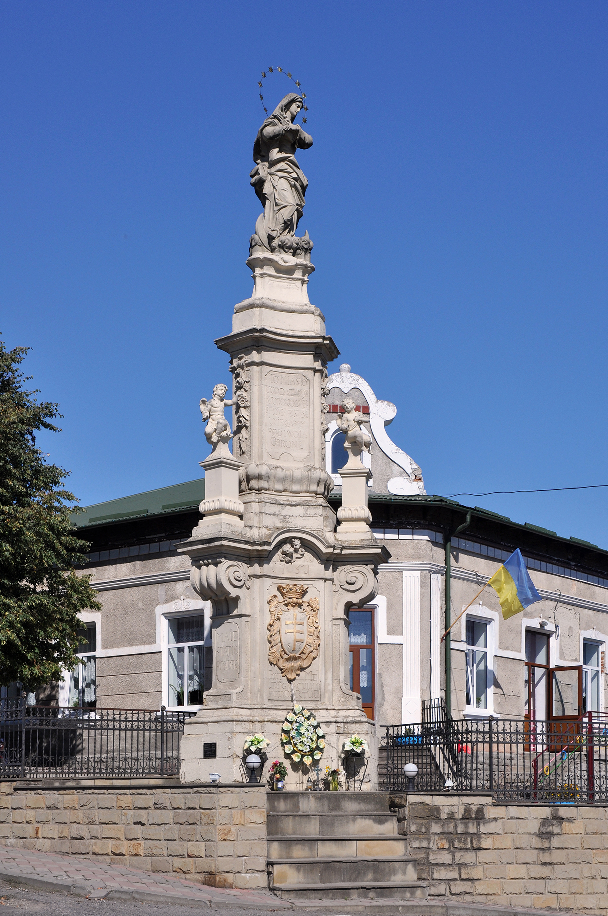 Скульптура Матері Божої, Бучач, вул. Б. Хмельницького, 2 (біля художньої школи)